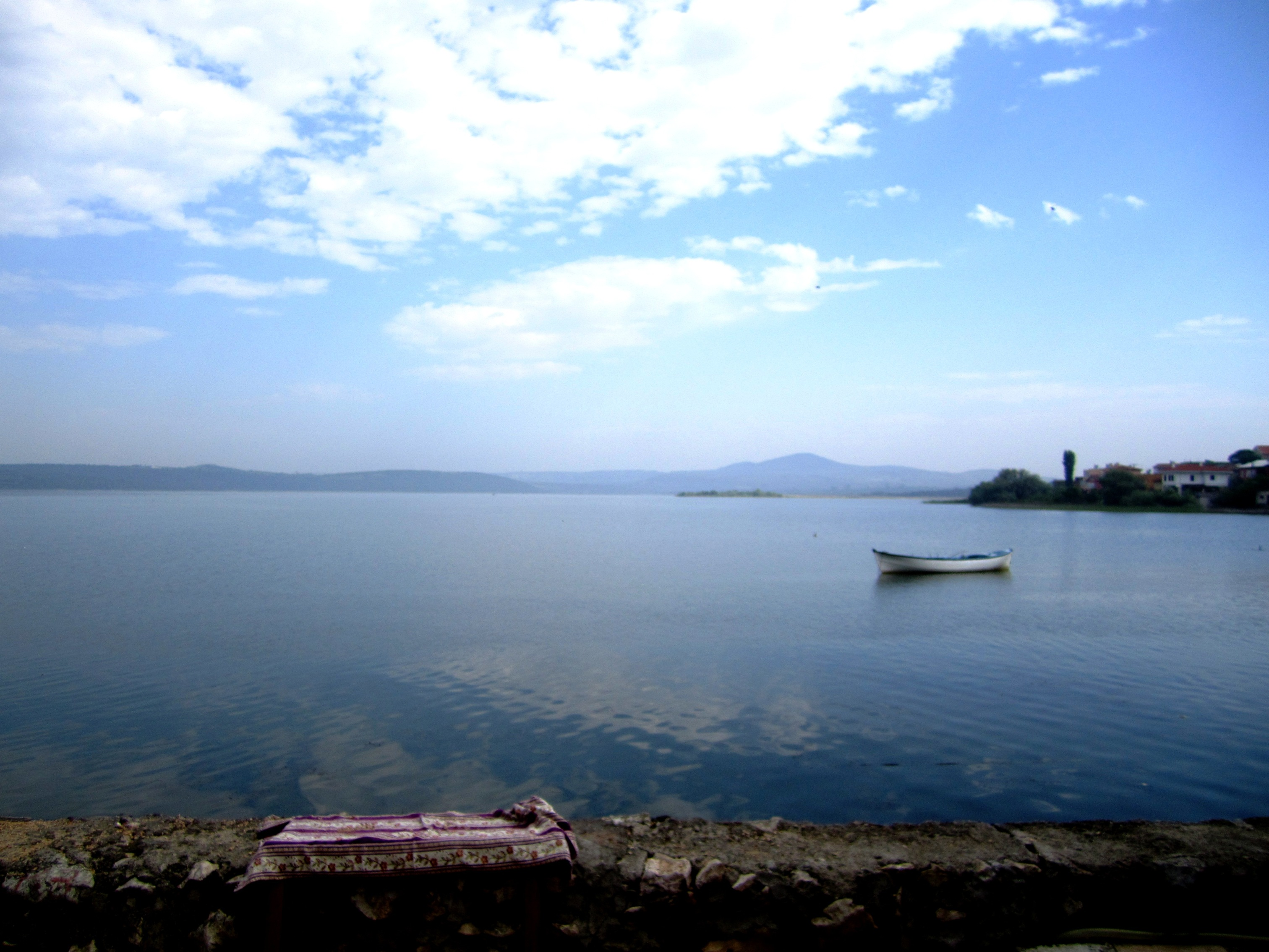 Der Ulubat von Golyazi